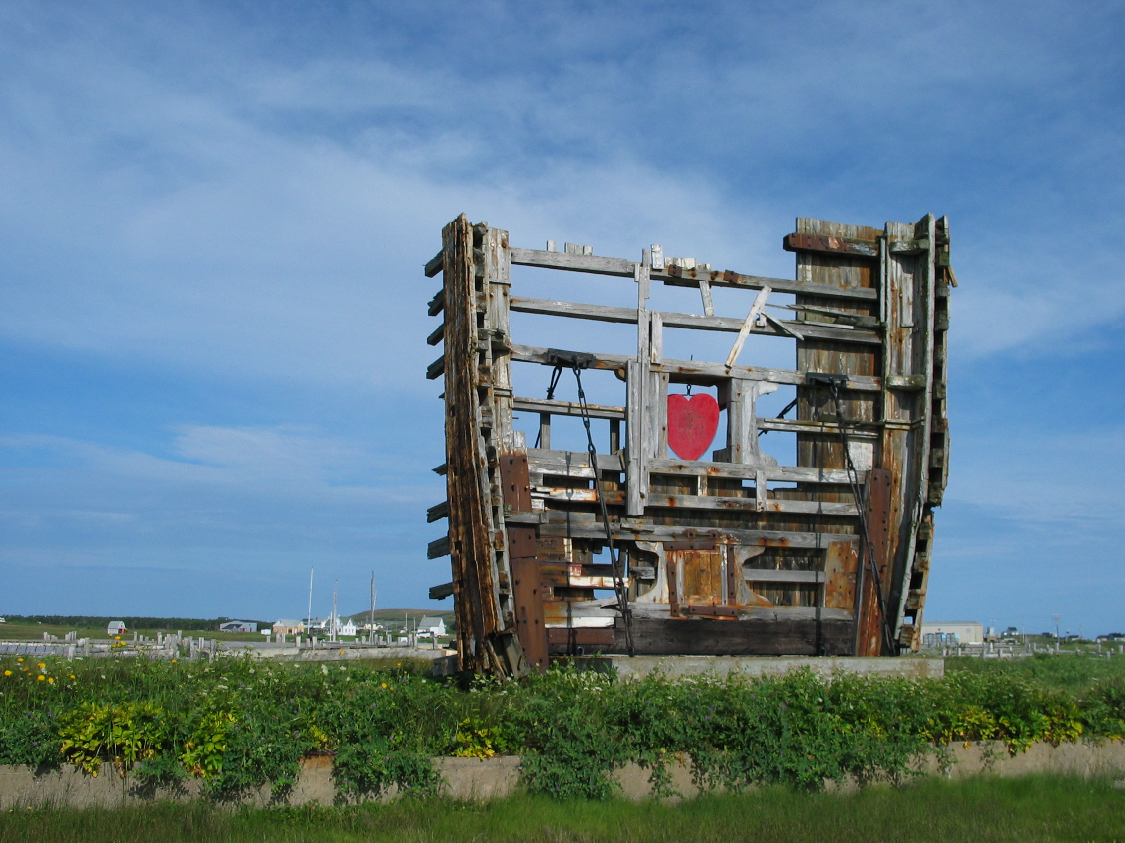 Sculpture monumentale. Le Coeur de Iles, 2000 Bois d’épave de bateau et acier 30‘ x 30‘ x 4‘ Havre Aubert, Iles de la Madeleine